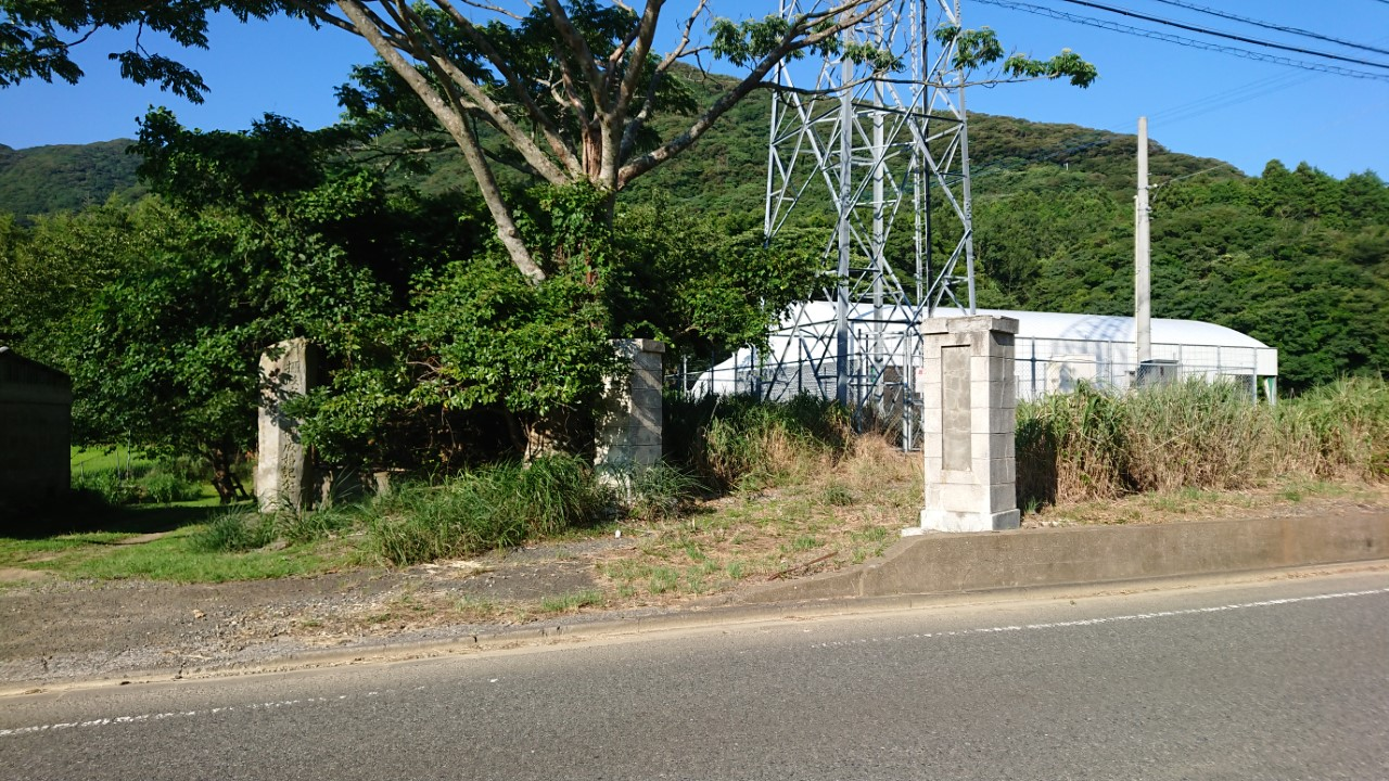 長崎県下県郡（現・対馬市）厳原町下原にあった東邦亜鉛株式会社が経営する技術者養成学校